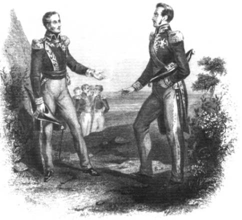 Encuentro de Simón Bolívar y José de San Martín en Guayaquil